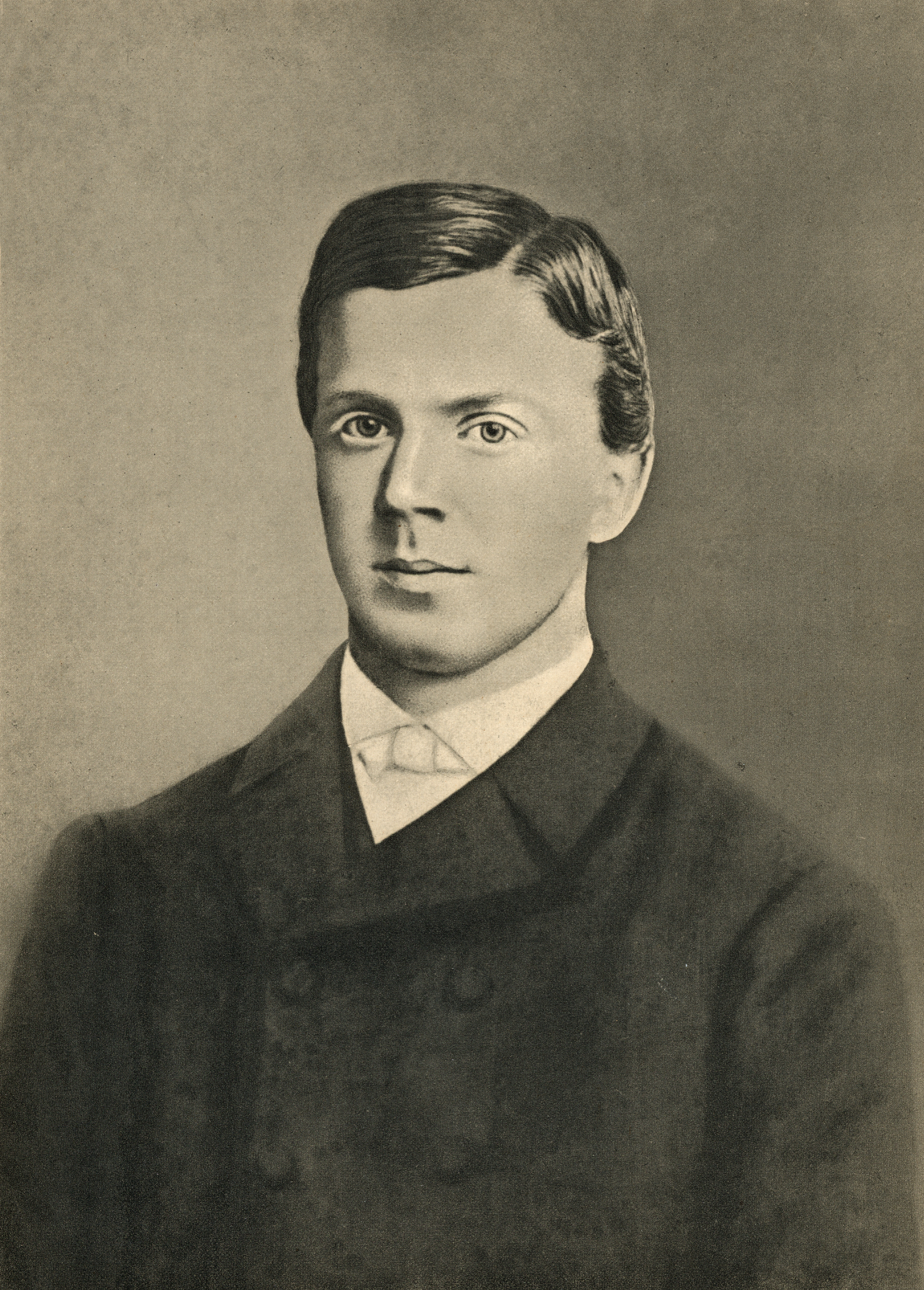 Format: Litografi Utgivelsesår / Published: 1914 (Vore Høvdinger 63). Utgiver / Publisher: F. Bruns Bokhandels Forlag, Trondhjem. Eier / Owner Institution: Trondheim byarkiv, The Municipal Archives of Trondheim Arkivreferanse / Archive reference: Ila skole, Va - F9407